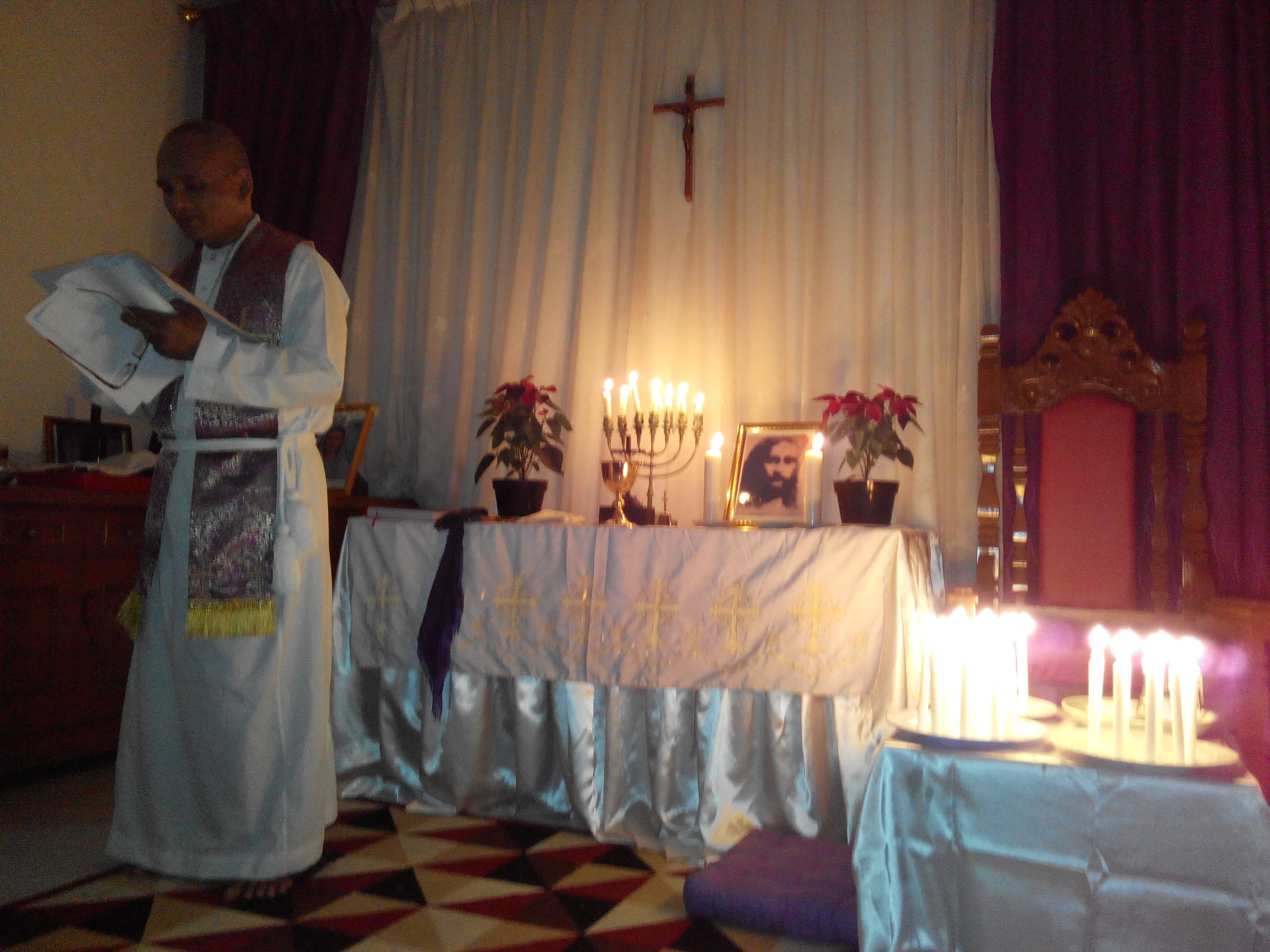 Perayaan Terang (Hari Mesias) 25 Desember